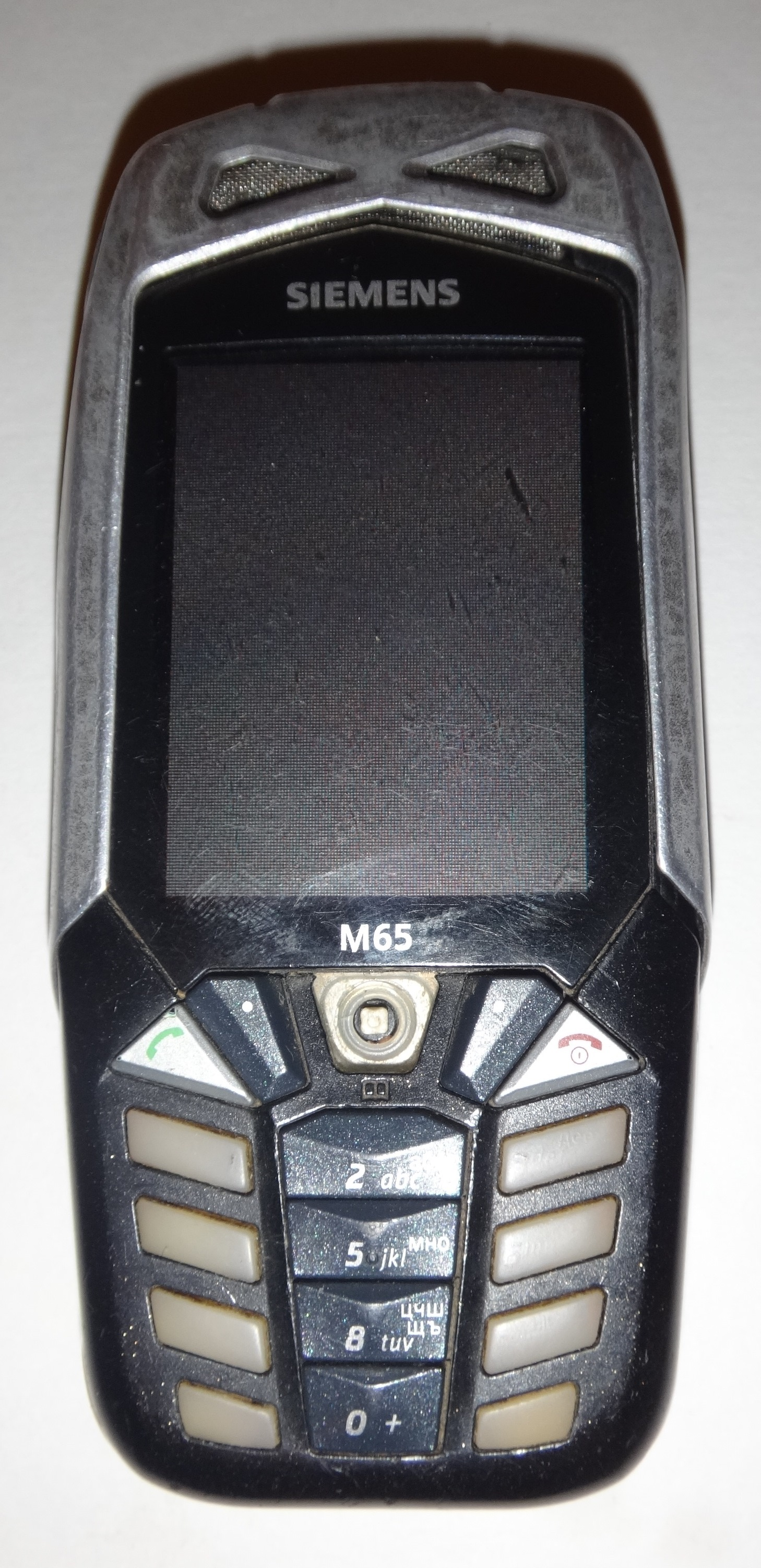 Siemens M65 в чёрном исполнении